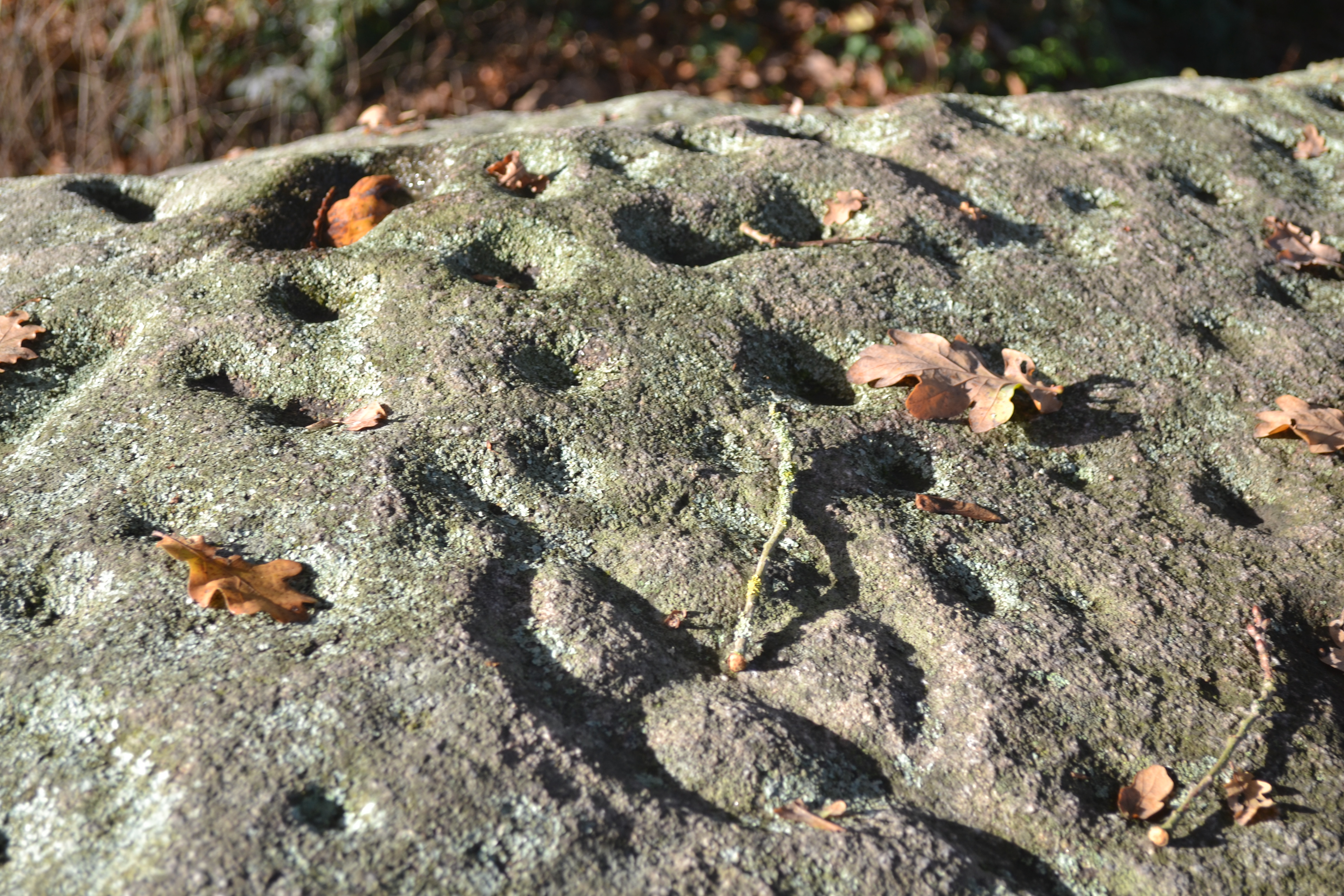 Pierre des Farfadets au Poiré-sur-Vie (85). Cupules en surface.